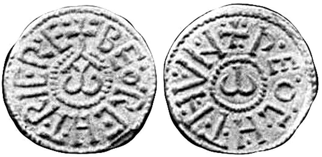 Münze des Königs Beorhtric (786–802) von Wessex, vermutlich um 795 in Winchester geprägt